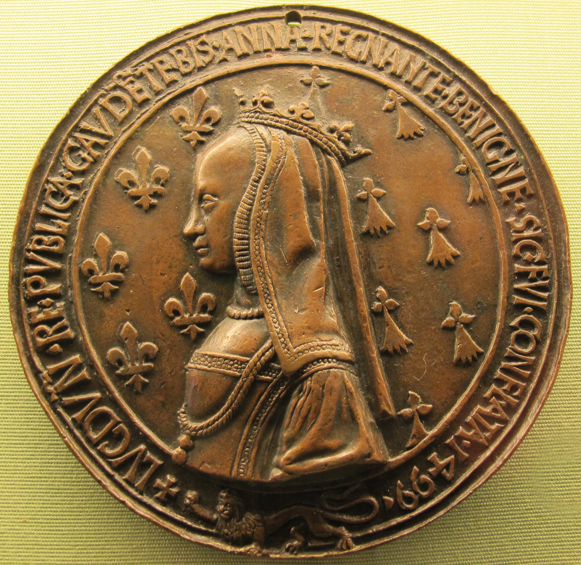 Carlo VIII e Anna di Bretagna visitano Lione 1499. Text in latin: LVGDVN · RE · PVBLICA · GAVDETE · BIS · ANNA · REGNANTE · BENIGNE · SIC · FVI · CONFL · ATA · 1499·